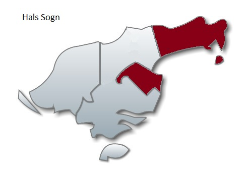 Hals Sogn på Læsø